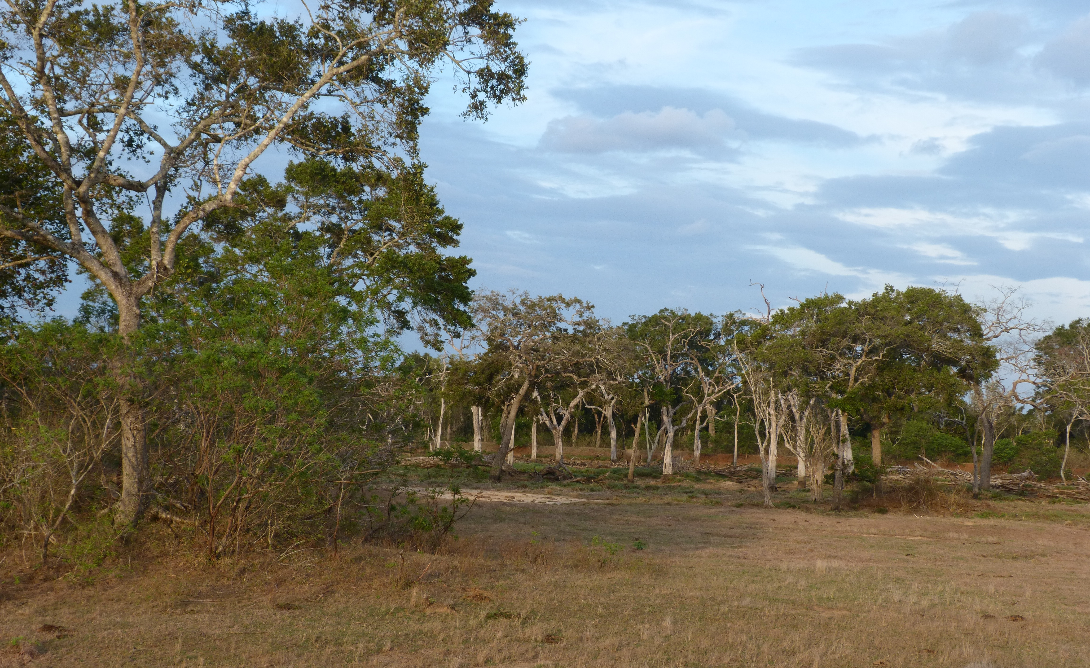 Landscape with elephant at Lunugamvehera National Park